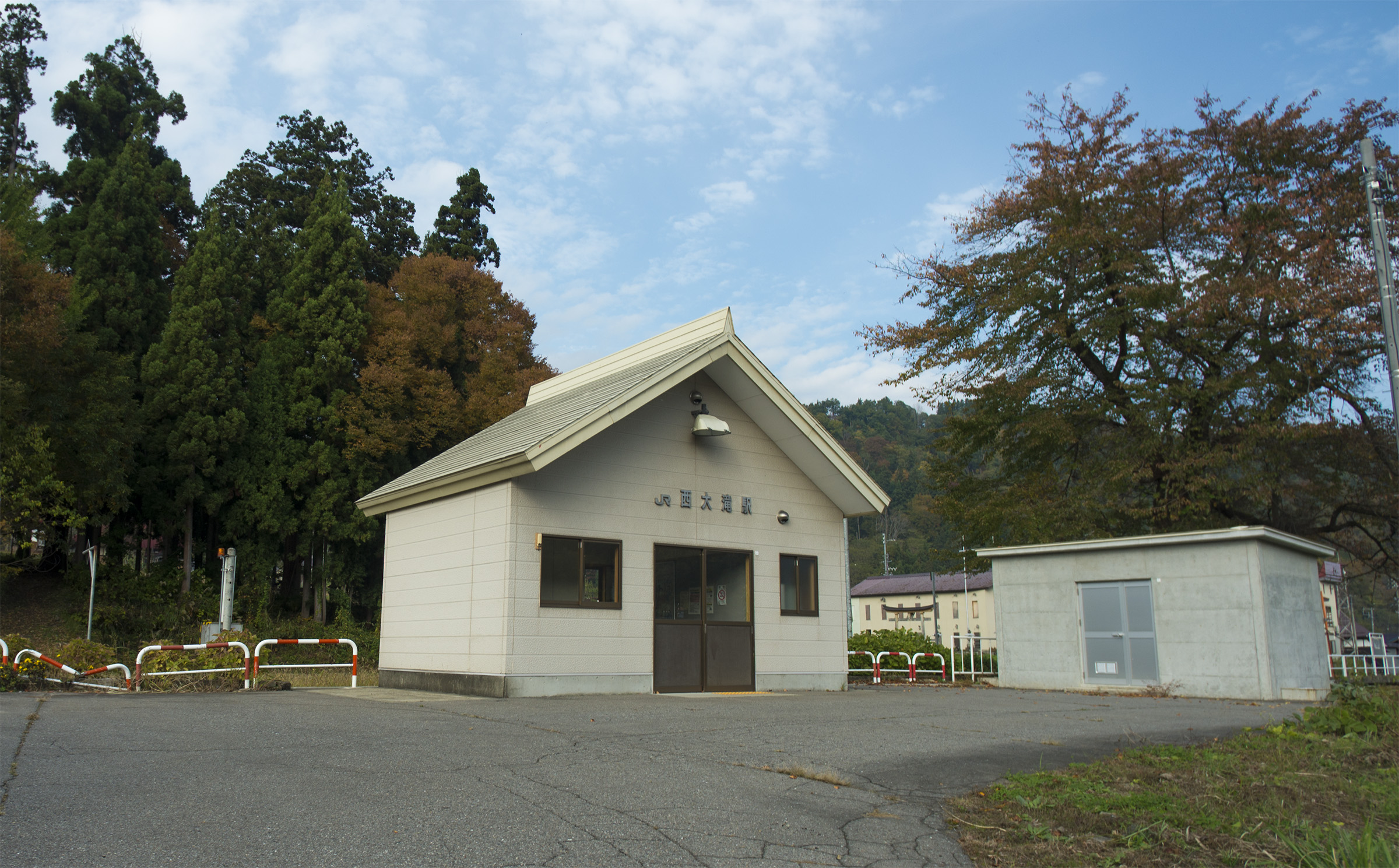 東日本旅客鉄道株式会社飯山線西大滝駅